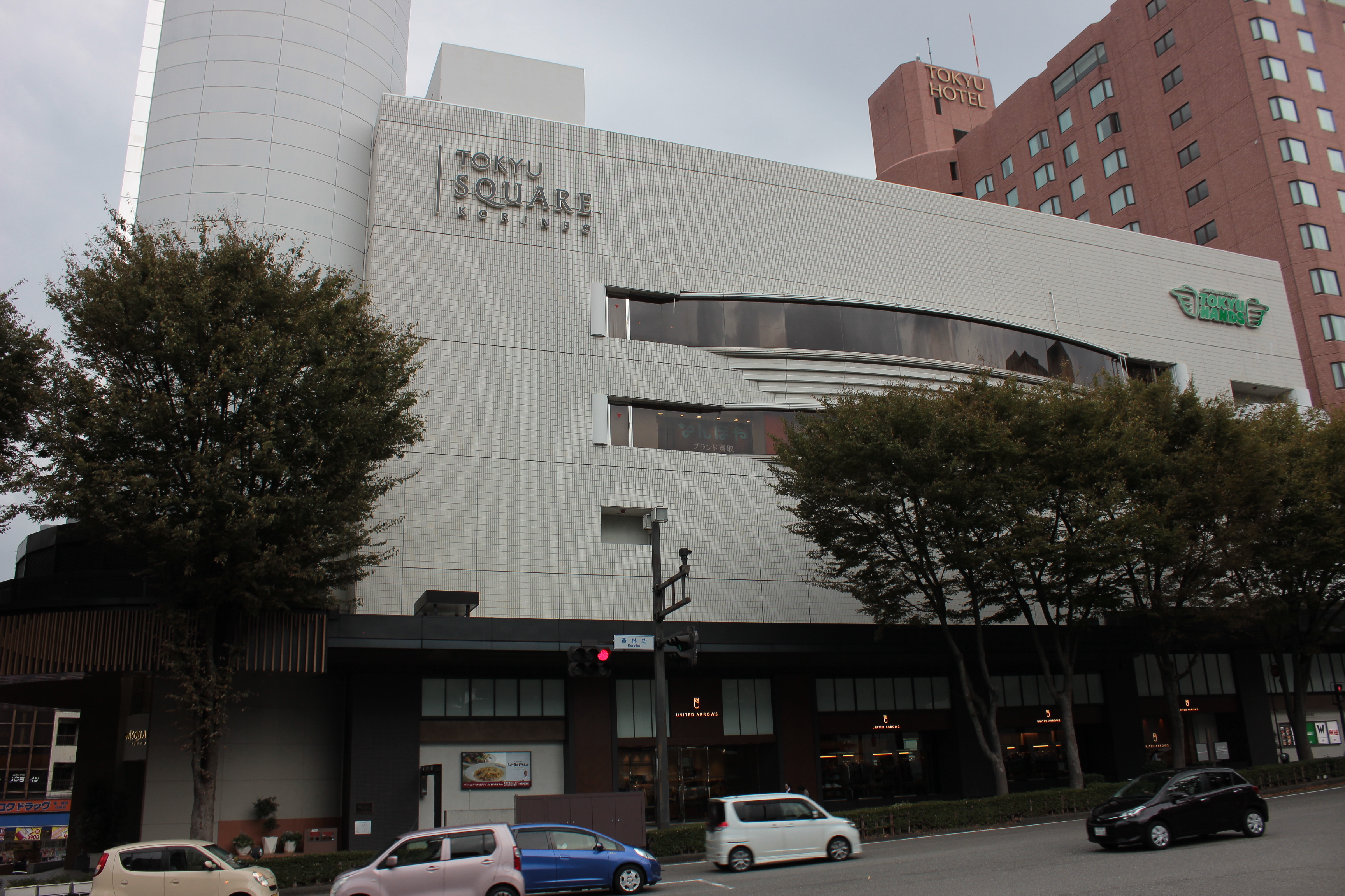 香林坊東急スクエア（石川県金沢市） Canon EOS Kiss X5